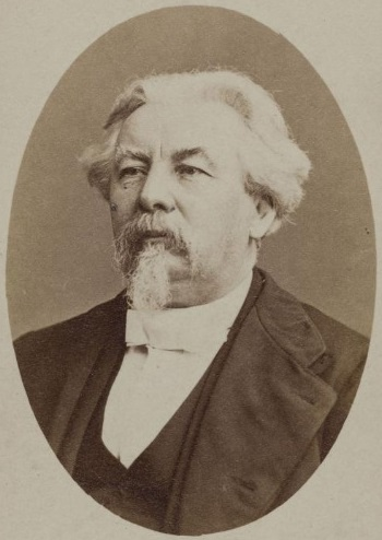 Edmond-Victor Régnier.